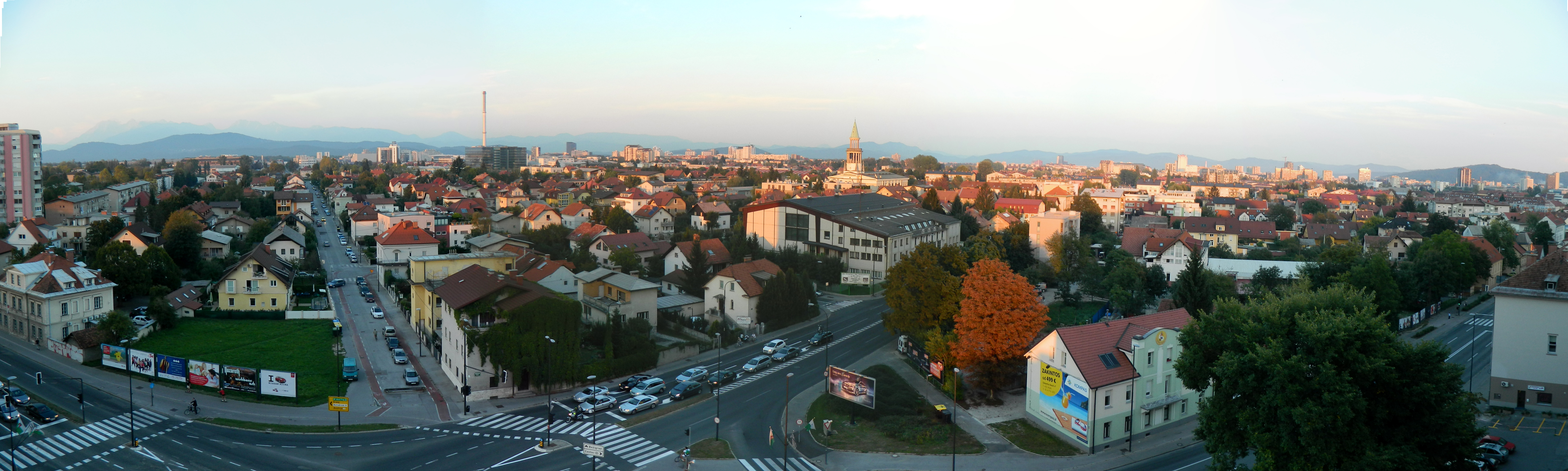 Panorama Šiške